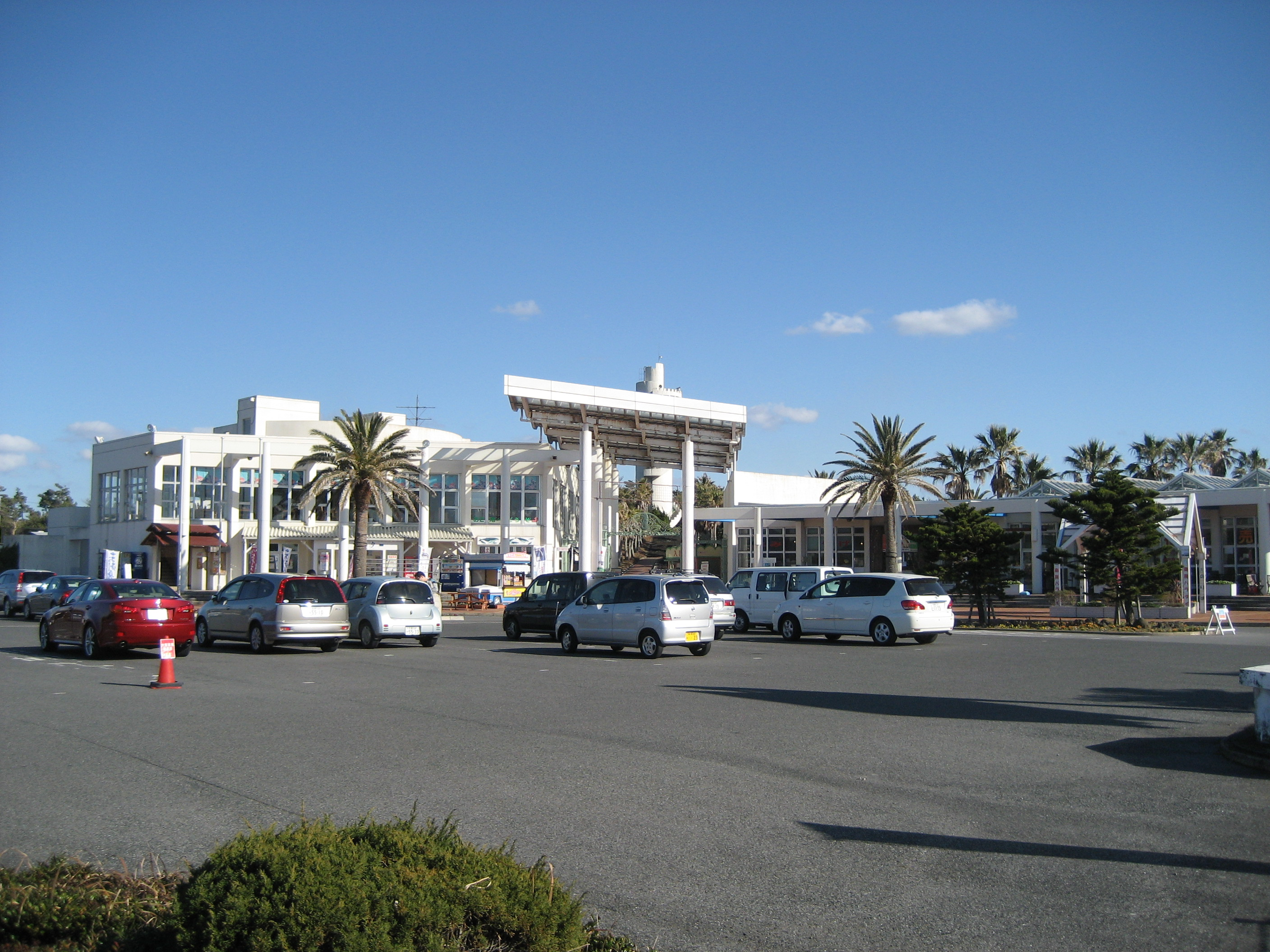 道の駅南房パラダイス駅舎